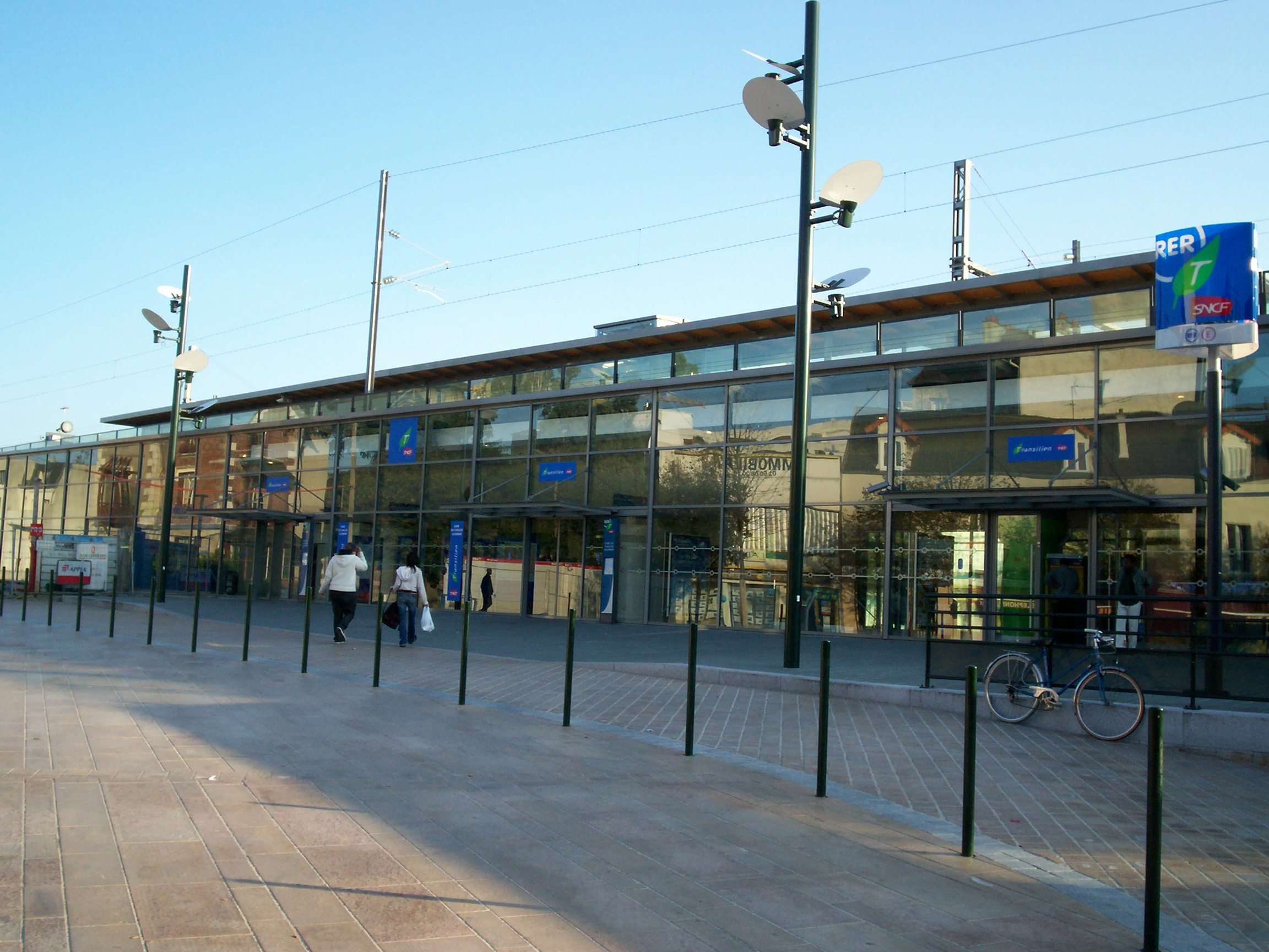 RER E - Gare de Chelles-Gournay